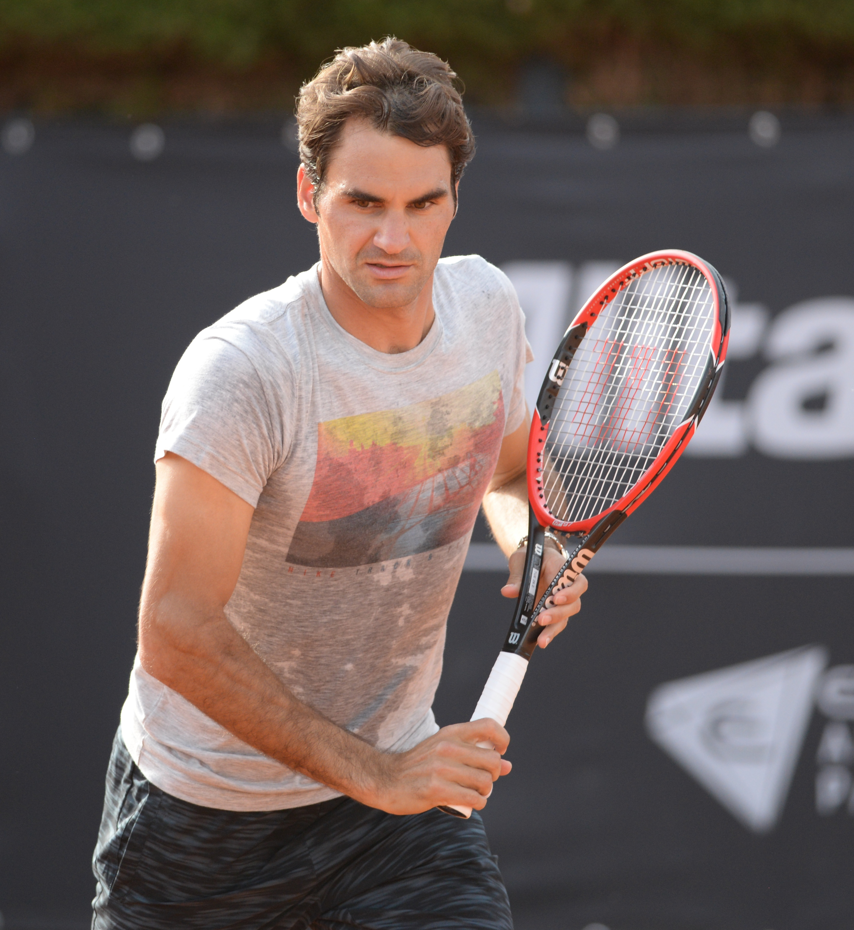 Roger Federer